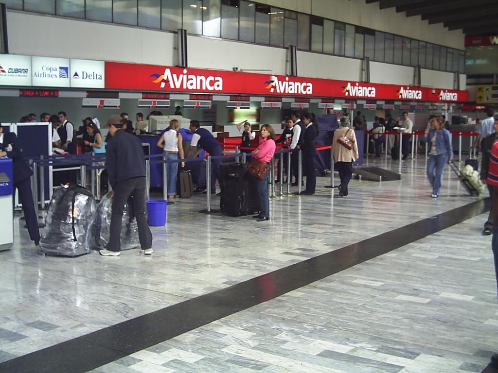 Vista del Aeropuerto El Dorado Area de Check in